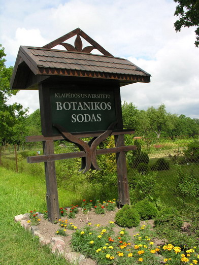 Klaipėdos universiteto botanikos sodas Foto: Algirdas, 2006 m. birželio 29 d.